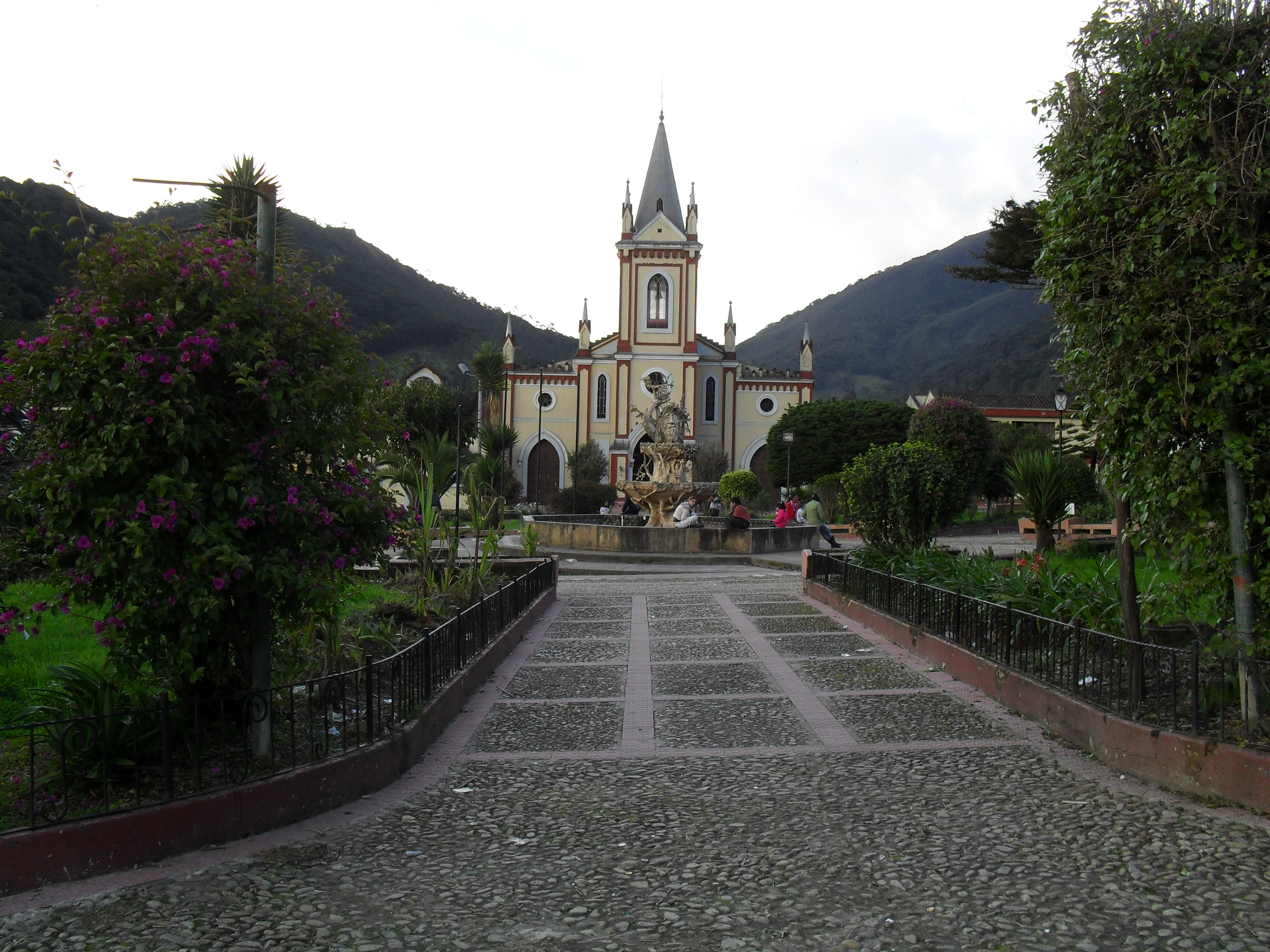 Parque de Arcabuco, Boyacá, Colombia